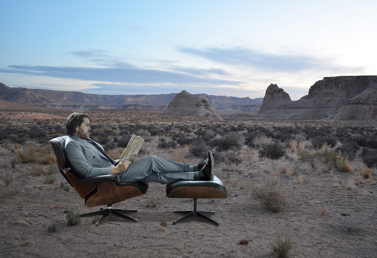 Jens Semjan auf einem Vitra Eames Lounge Chair in der Wüste von Utah in den USA